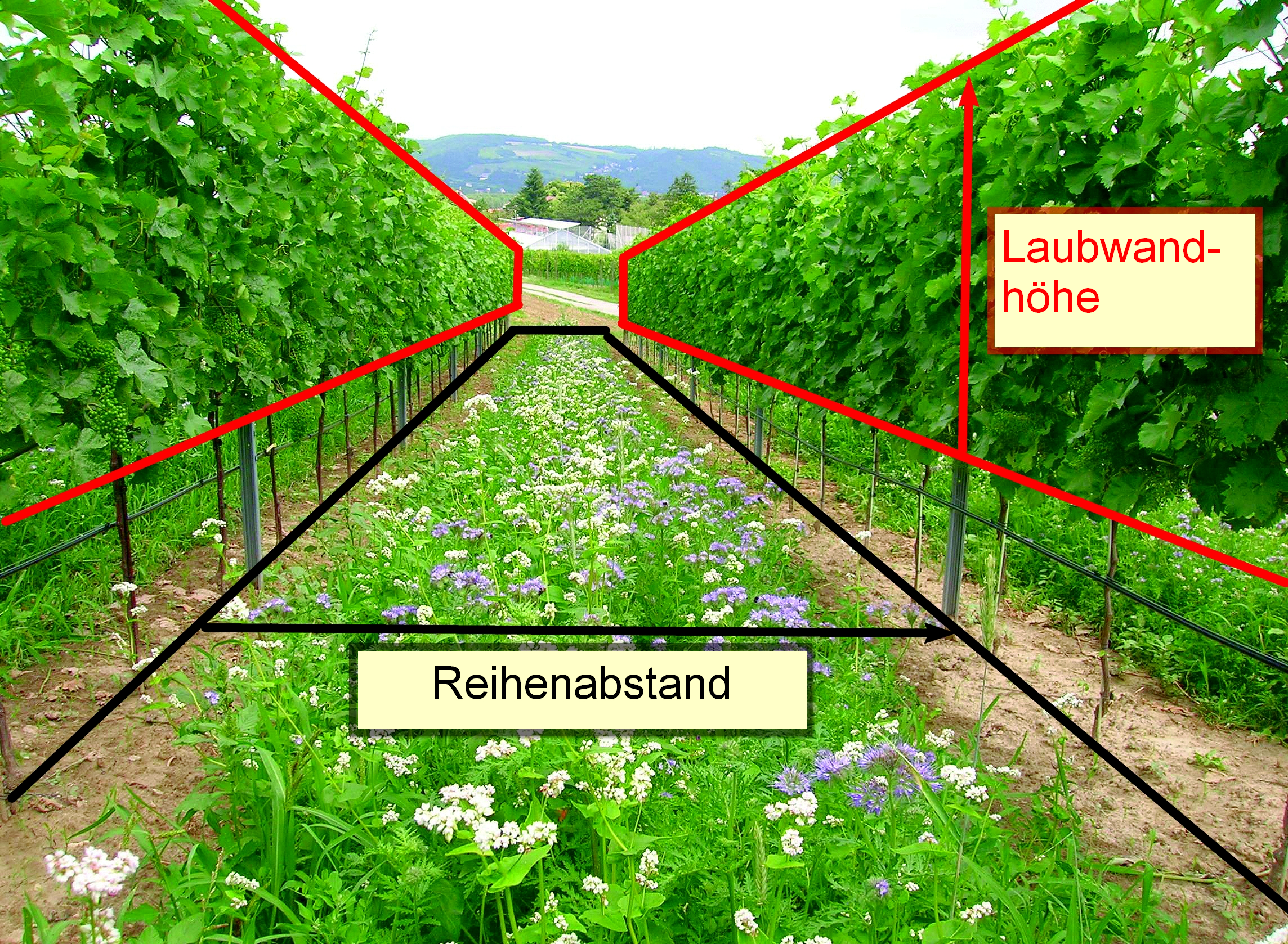 Laubwandflächenentwicklung in Abhängigkeit von unterschiedlicher Laubwandhöhen und Reihenentfernungen